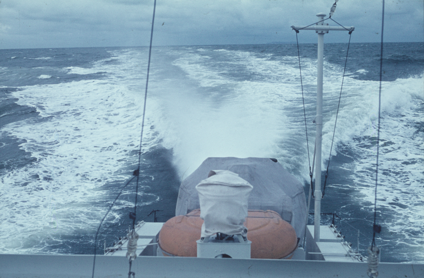 Pfeil